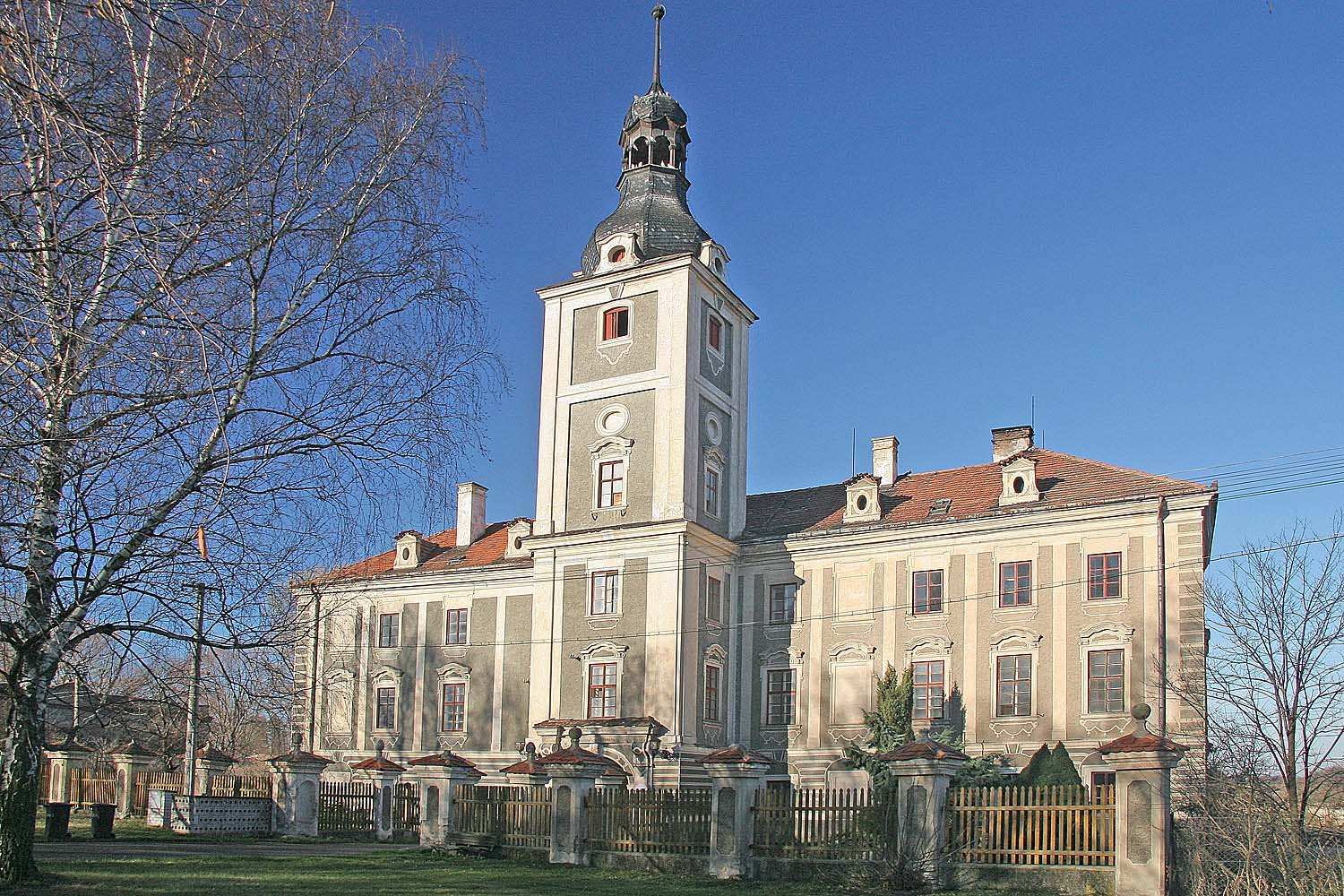 Zámek v obci Tupadly, district Kutná Hora autor: Prazak date: 15. 12. 2006